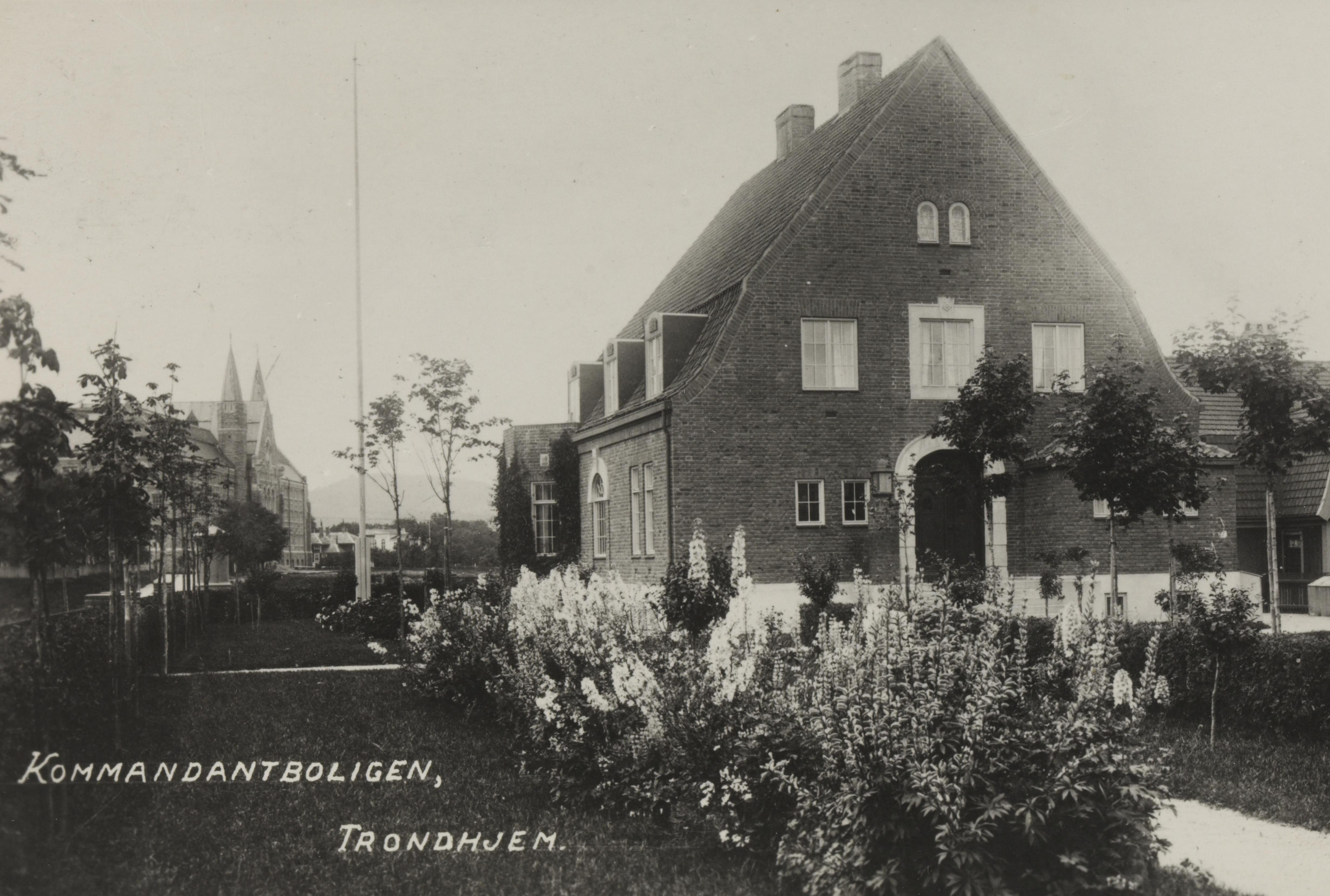 Bildet er hentet fra Nasjonalbibliotekets bildesamling Singsaker, Trondheim, Sør Trøndelag